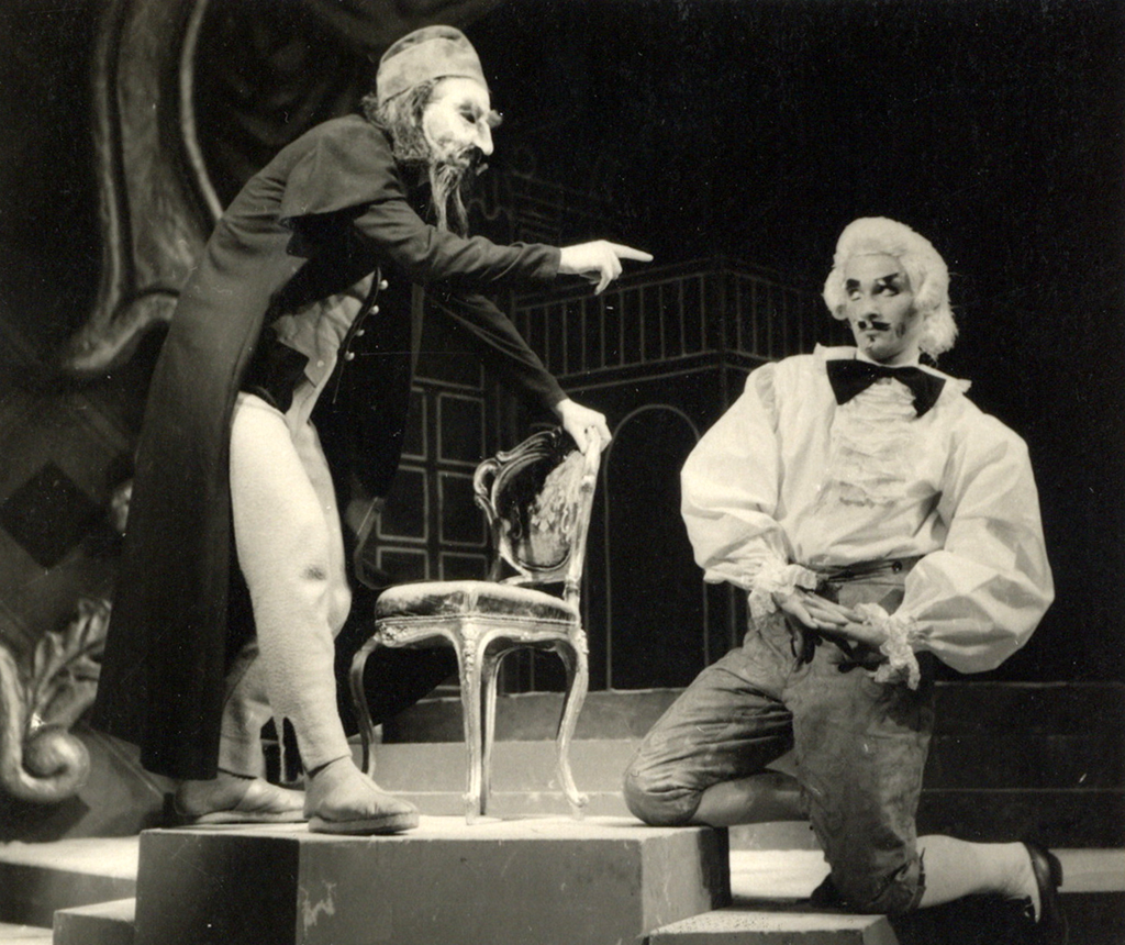 Carlo Goldoni, Lažnik, Drama SNG v Ljubljani. Na fotografiji: Aleksander Valič (Pantalone), Andrej Kurent (Lelio).